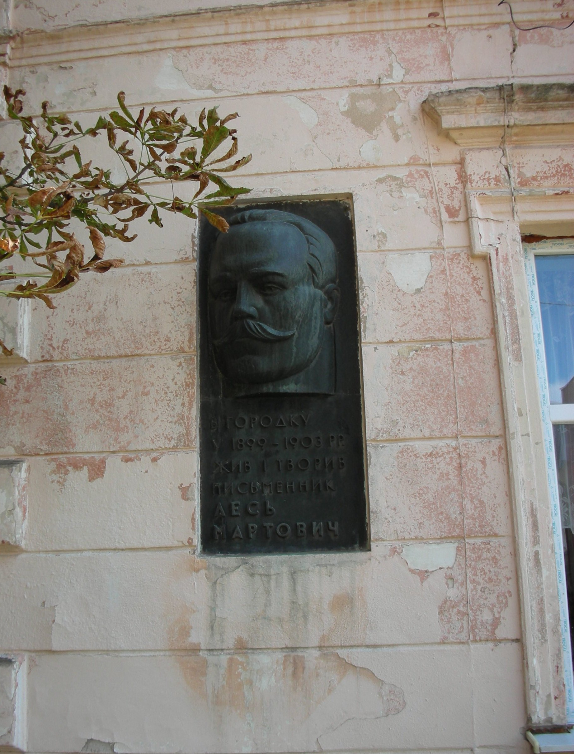 Будинок, в якому жив і працював Лесь Мартович, український письменник (худ.-мем. табл., ск. В. Липовий, 1971 р., бронза), Городок, вул. Мартовича, 3